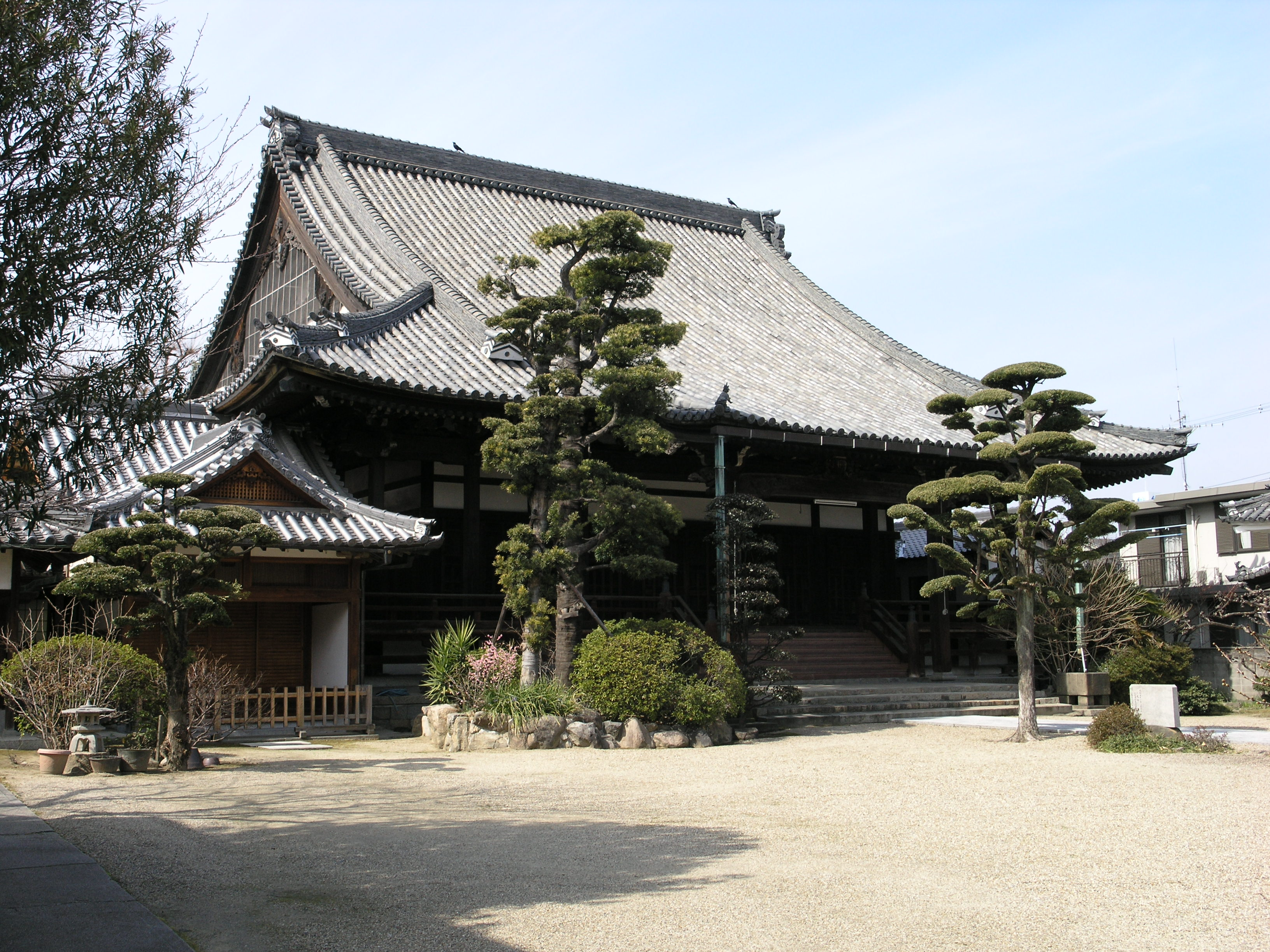 Jiganji in Yao, Osaka, Japan